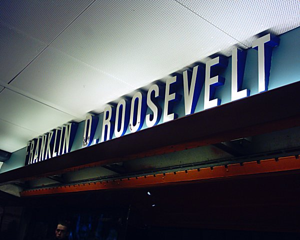 Station Franklin Roosevelt du Métropolitain de Paris.